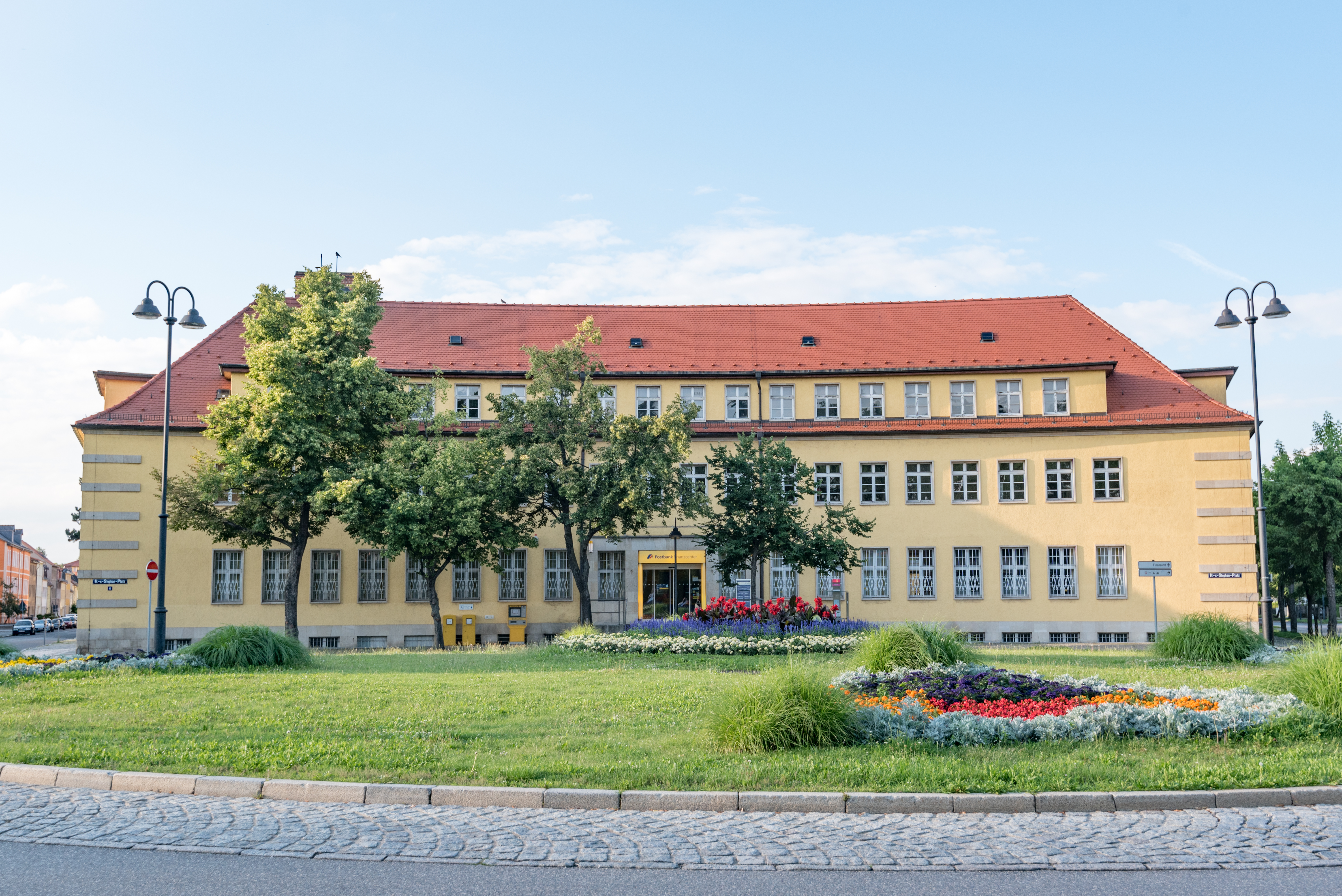 Naumburg (Saale), Heinrich-von-Stephan-Platz 6